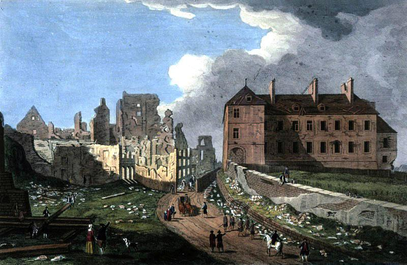 Une vue de l'archevêché de Québec et des ruines autour, tels qu'on peut les voir en montant de la basse-ville, en 1759. Peinture de Richard Short, Gracieuseté de Bibliothèque et Archives Canada, C-000350